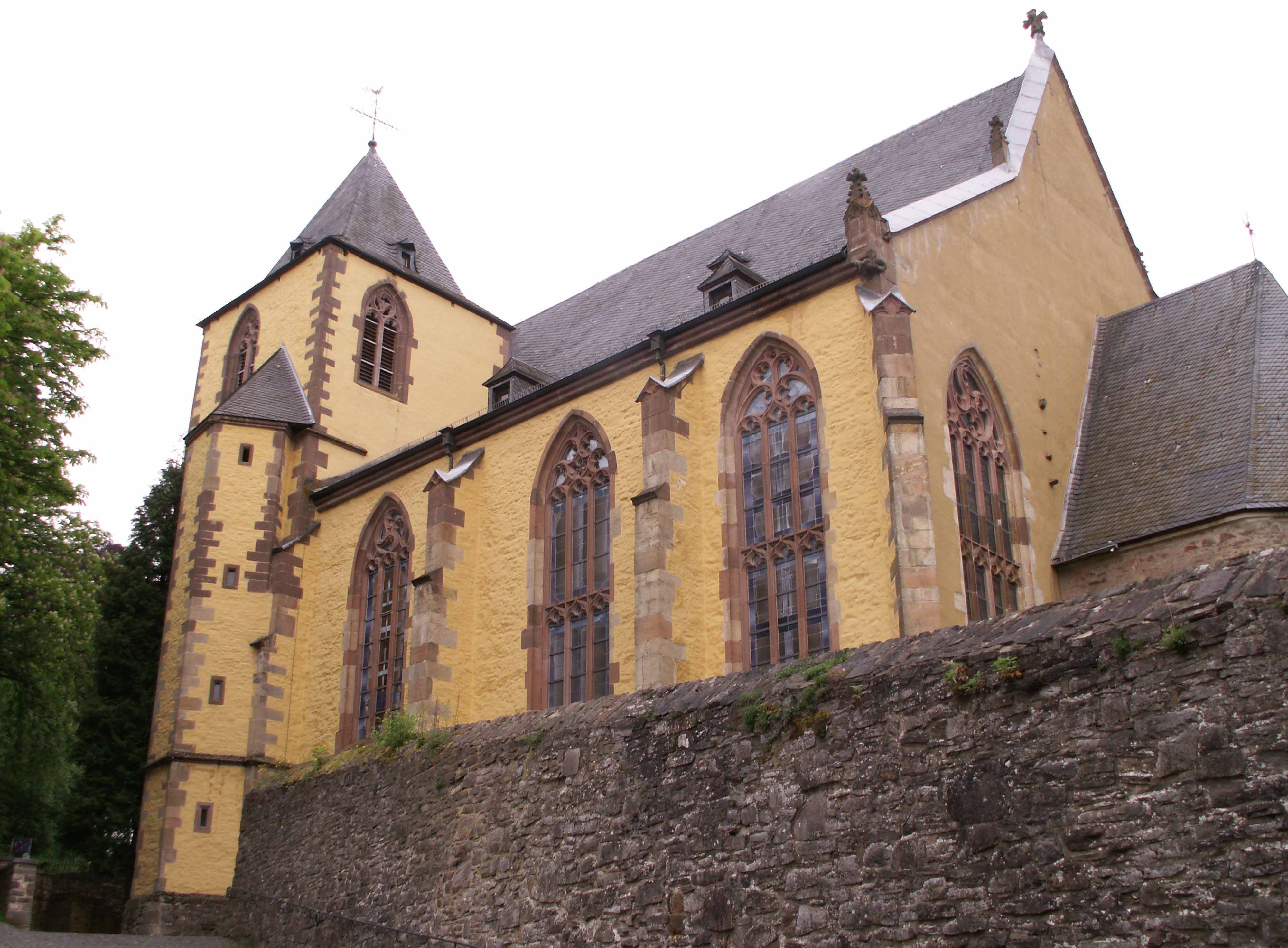 Spätgotische Hallenkirche